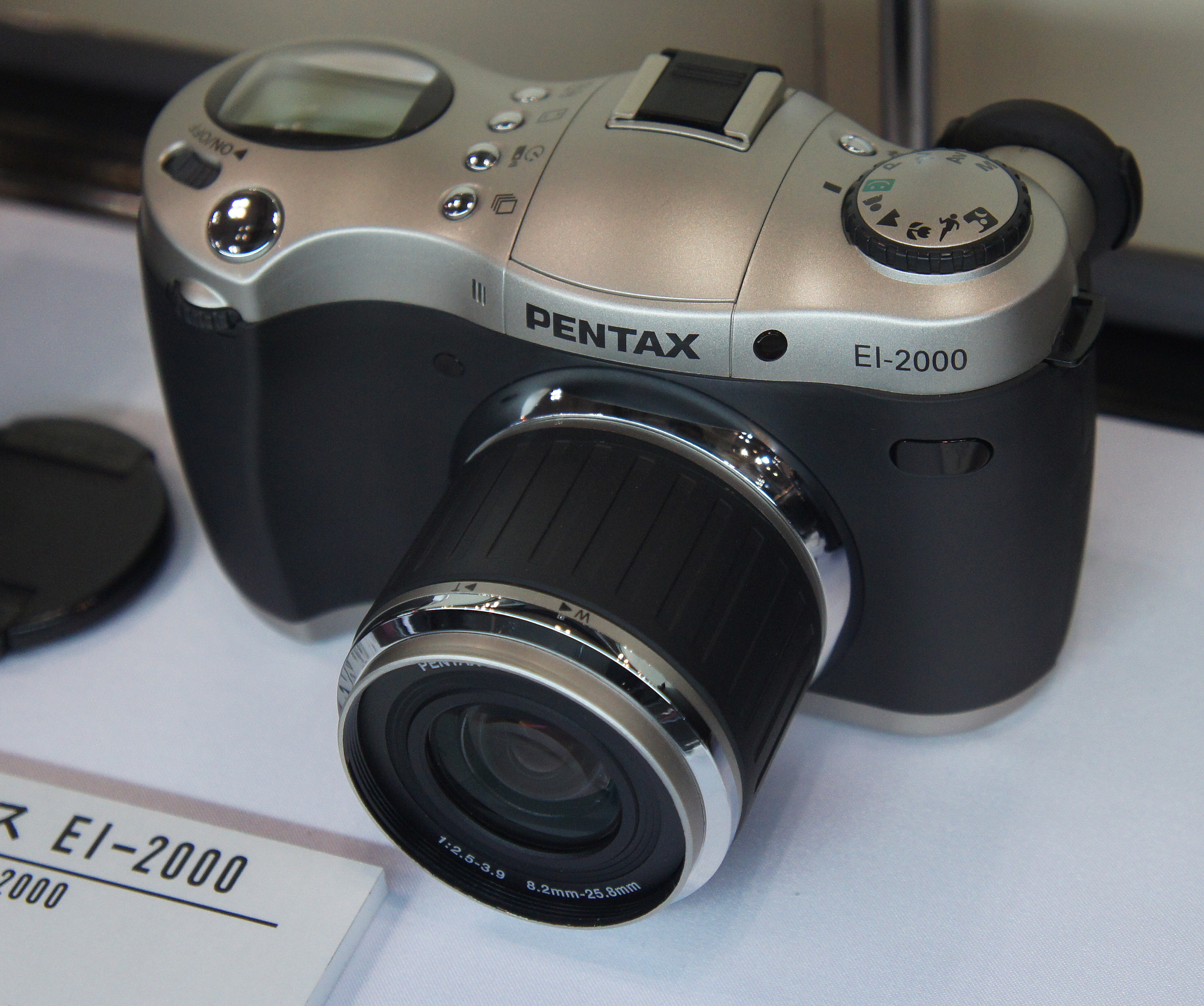 CP+ 2011: 2000 Pentax EI-2000